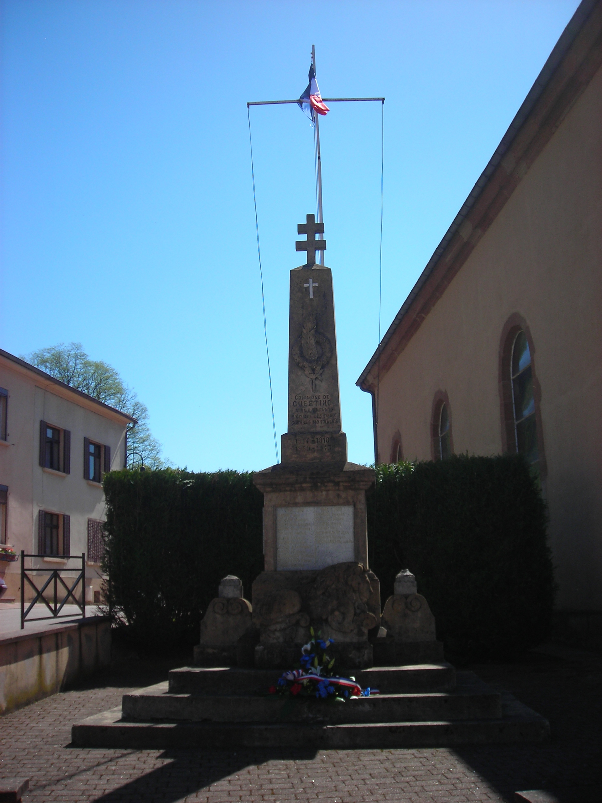 Monument aux morts de Guerting